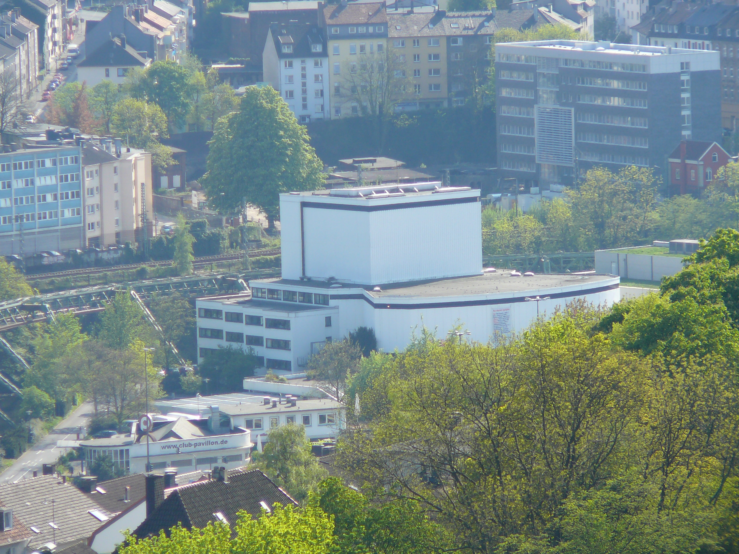 Hardt-Anlagen, Wuppertal